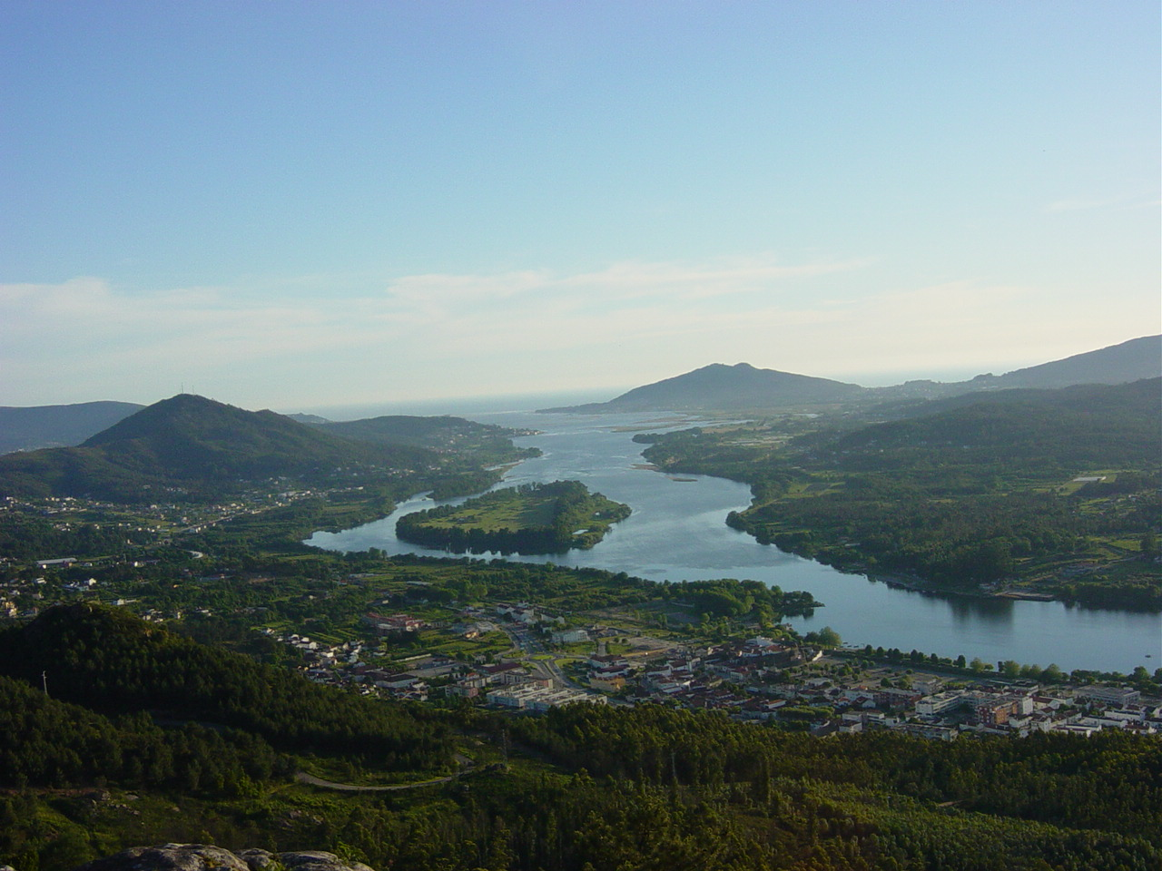 Vista da foz do rio Minho a partir de Vila Nova de Cerveira This is a photography of a Site of Community Importance in Portugal with the ID: PTCON0019. Natura2000 entry, EEA entry